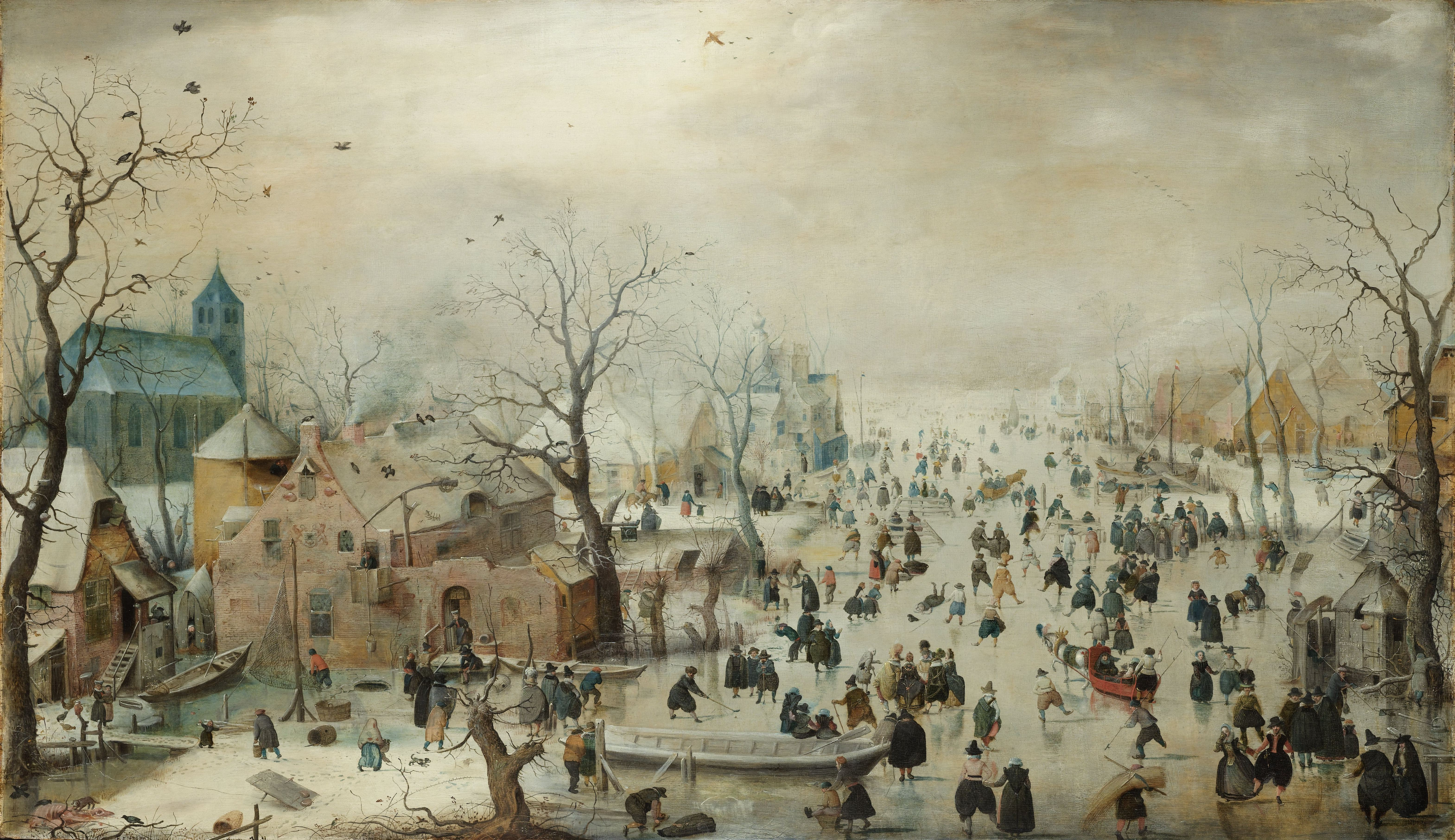 Winterlandschap met ijsvermaak. Dorpsgezicht met vele figuren op het ijs: schaatsers, kolfspelers, wandelaars. Rechts een arrenslede, links een kerk.